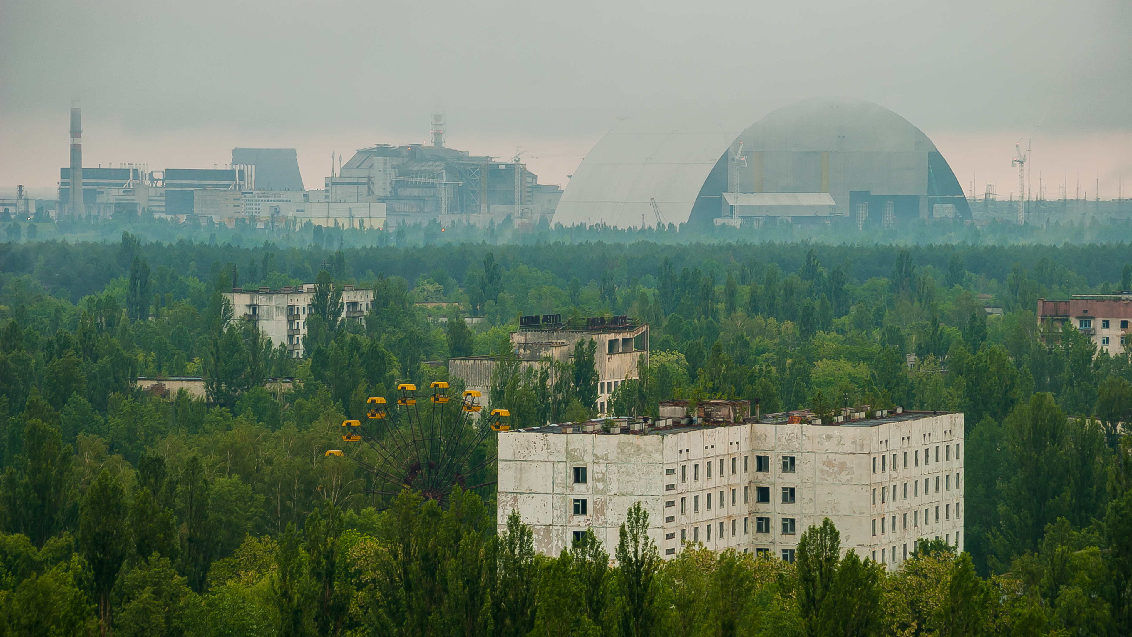 Чорнобильський радіаційно-екологічний біосферний заповідник, Іванківський район, Поліський район, в межах зони відчуження і зони безумовного (обов'язкового) відселення території, що зазнала радіоактивного забруднення внаслідок Чорнобильської катастрофи